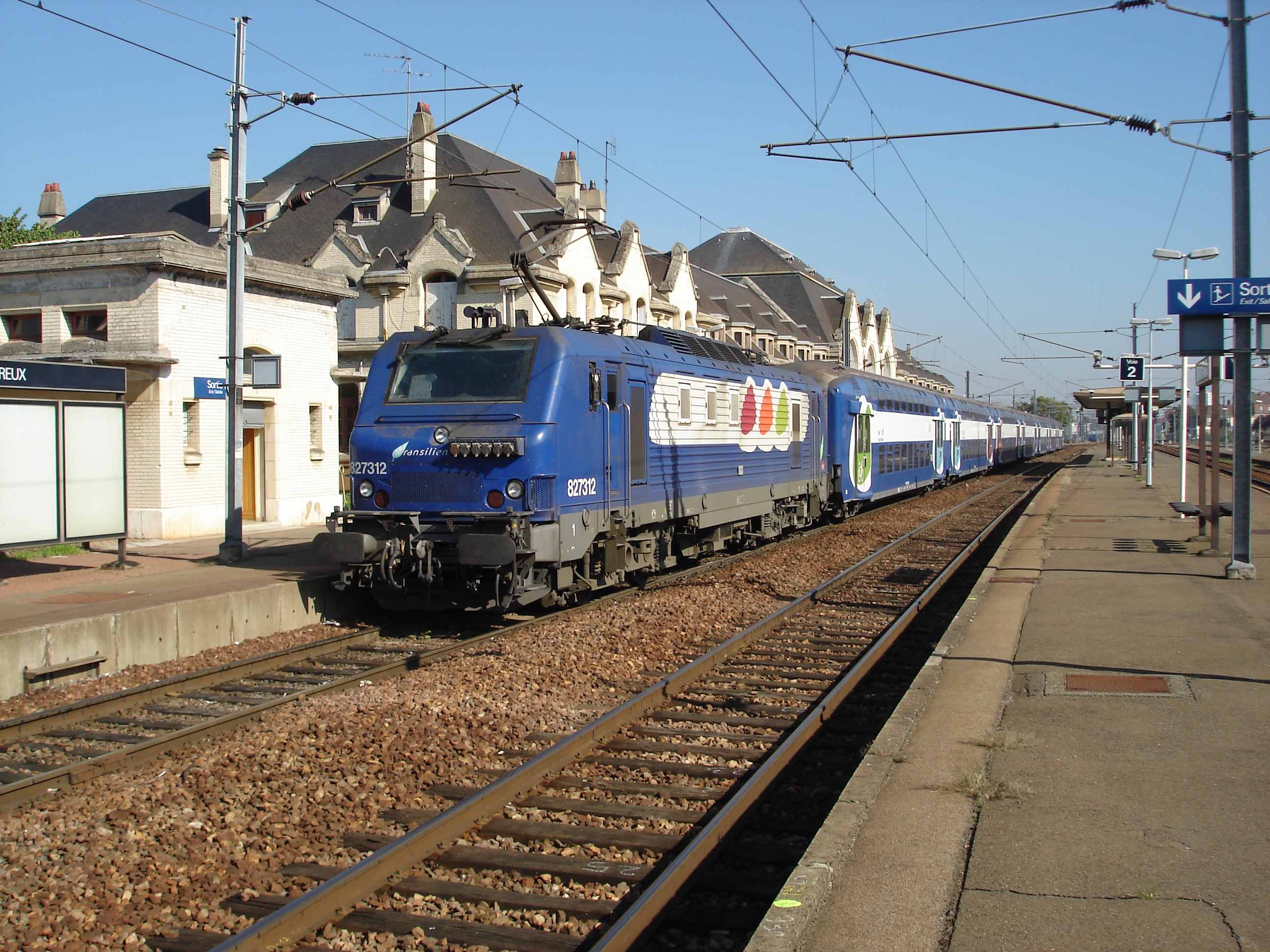 Gare de Dreux (28) : Le train Transilien N (BB 27312 et VB 2N), à son terminus.